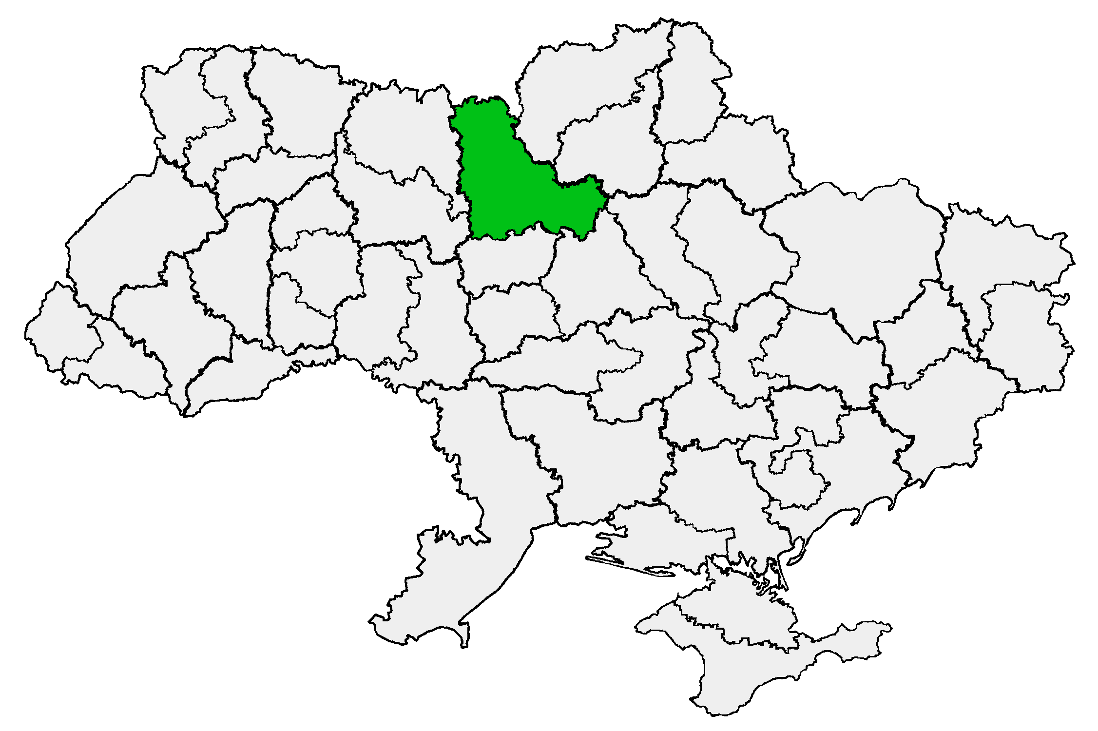 Київська єпархія УПЦ (МП)